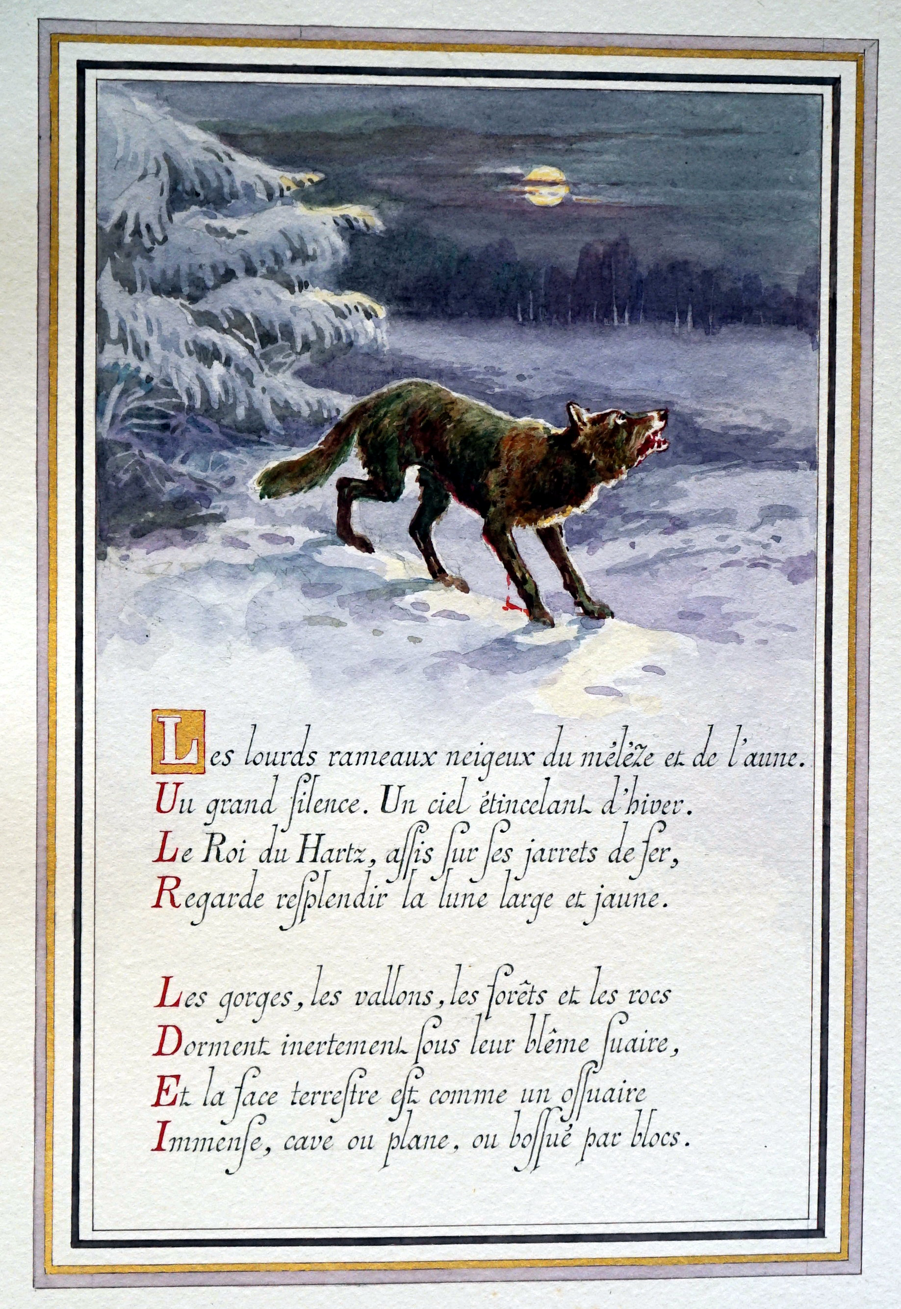 oeuvre calligraphiée et décorée par Auger pour Diancourt.